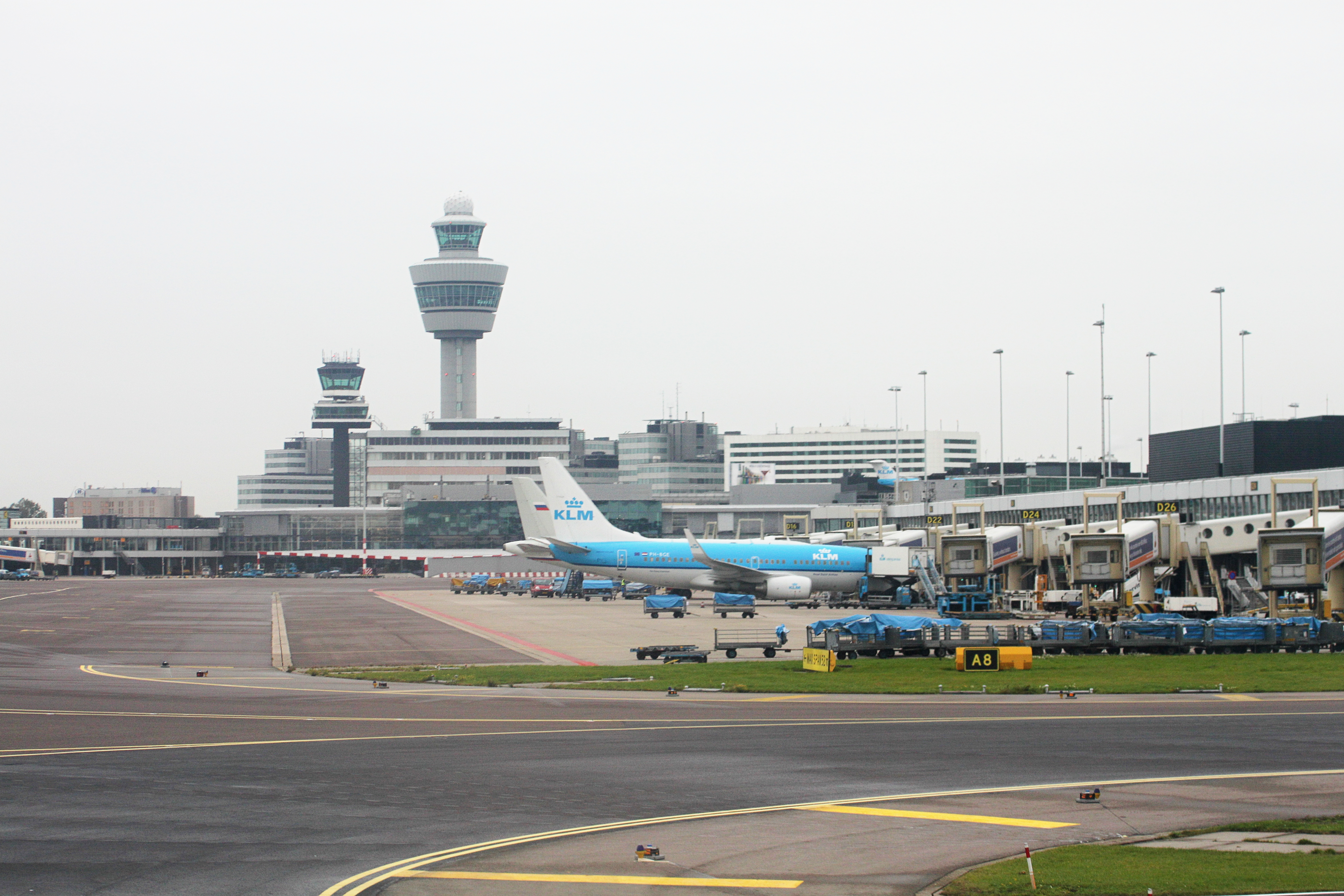 Flughafen Schiphol, Amsterdam